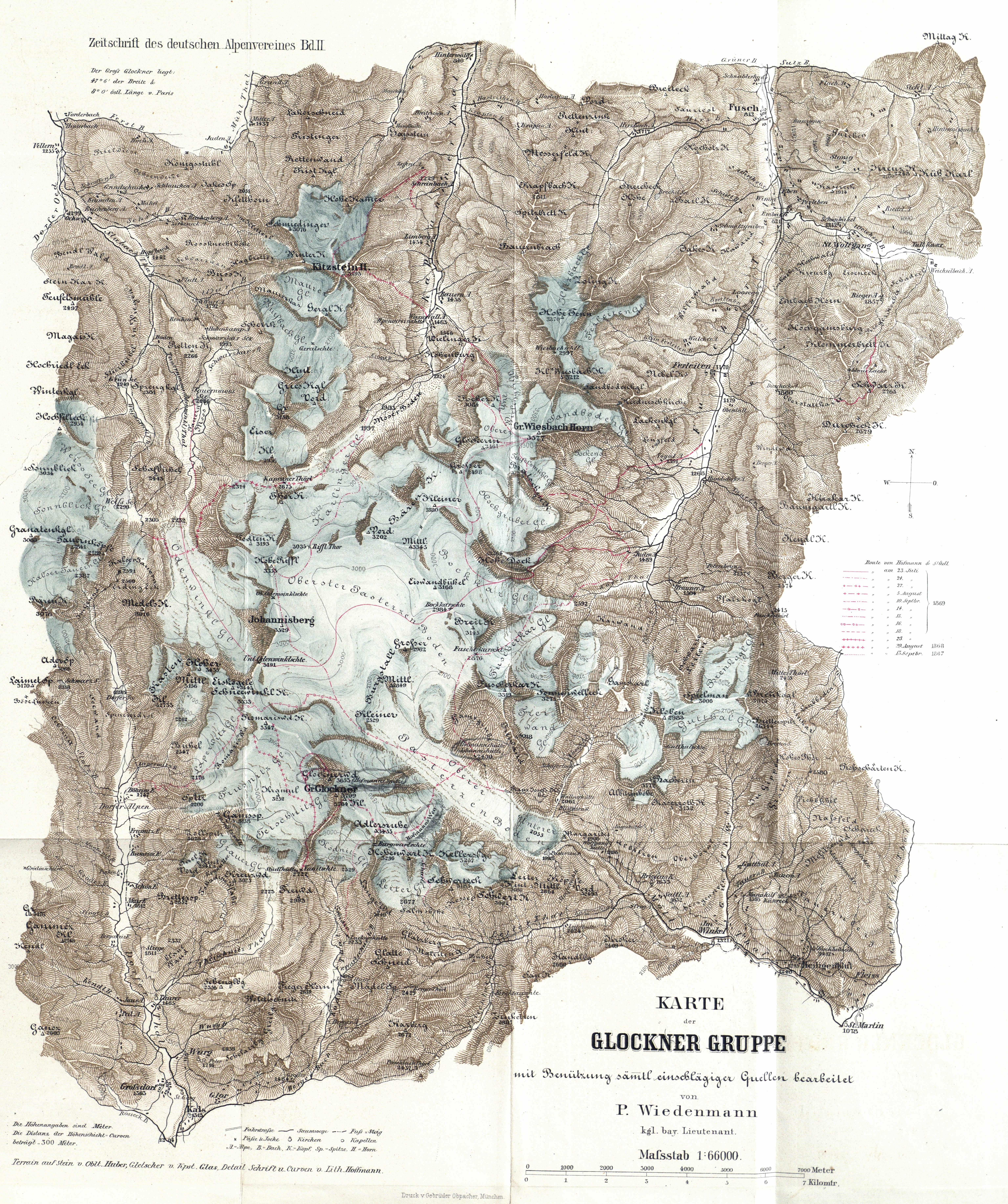 Karte der Glocknergruppe von Peter Wiedenmann kgl. bay. Lieutenant aus Zeitschrift des Deutschen Alpenvereins 1871 Band II. Vereinsjahr 1870-1871